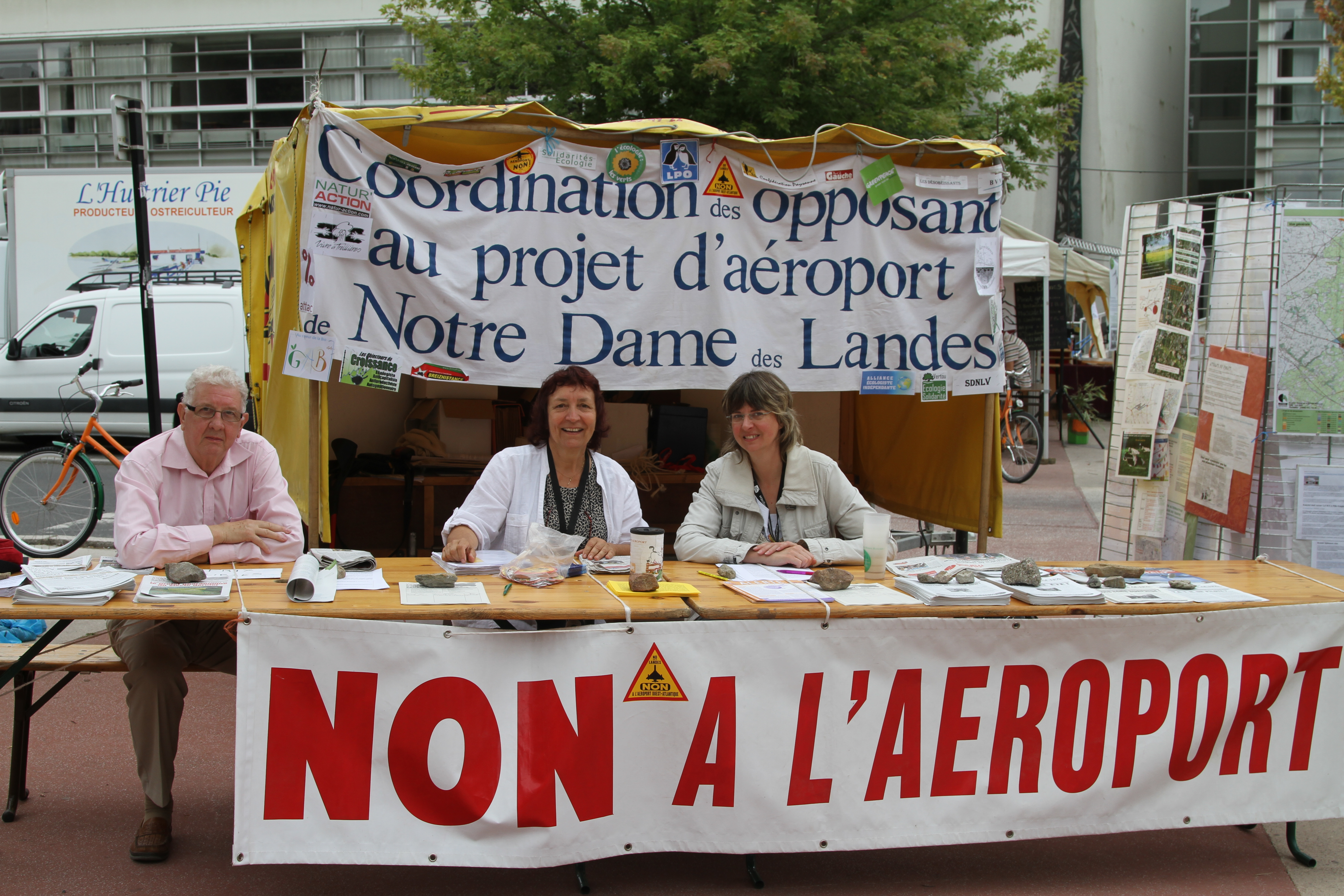 Stand des opposants au projet d'aéroport à Notre dames des Landes aux journées d'été Europe Ecologie - les verts 2010 à Nantes